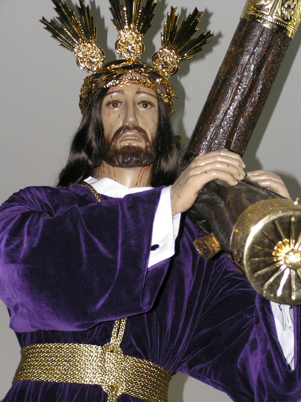 Nuestro Padre Jeús Nazareno, el Viernes Santo